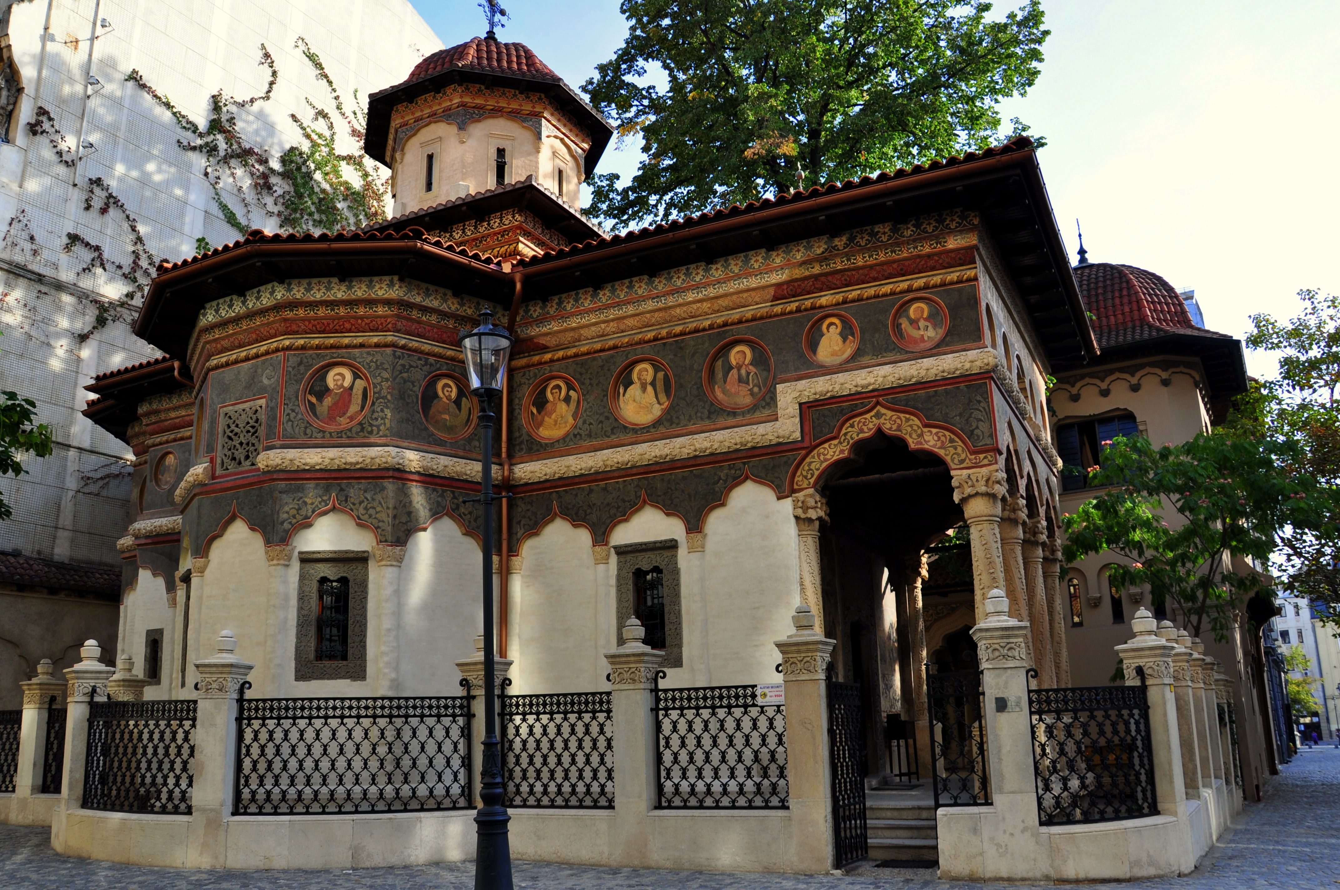 Ansamblul Bisericii Stavropoleos